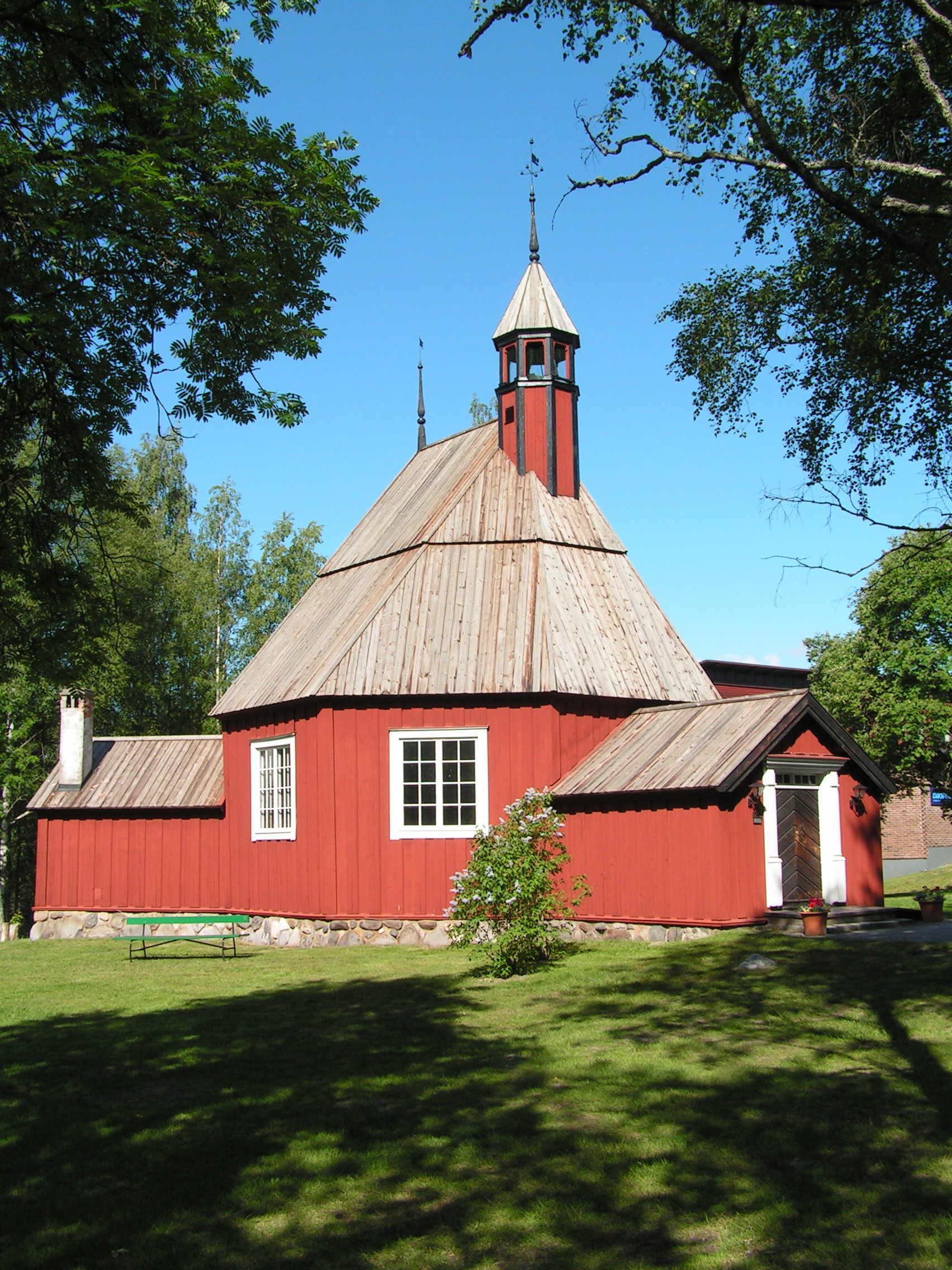 Helena Elisabeth Church, Umeå, Sweden (Gammliakyrkan)